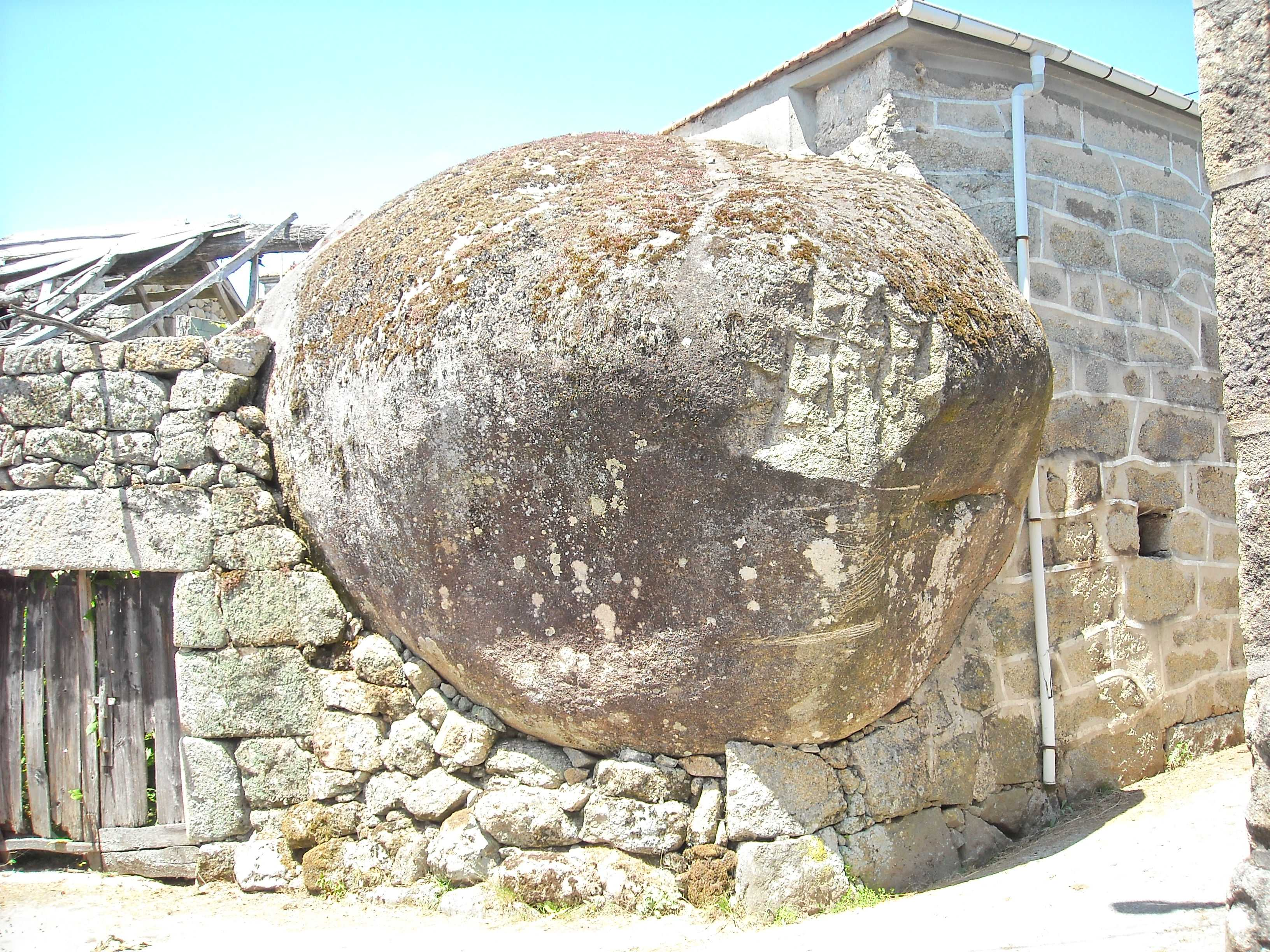 Ver título.